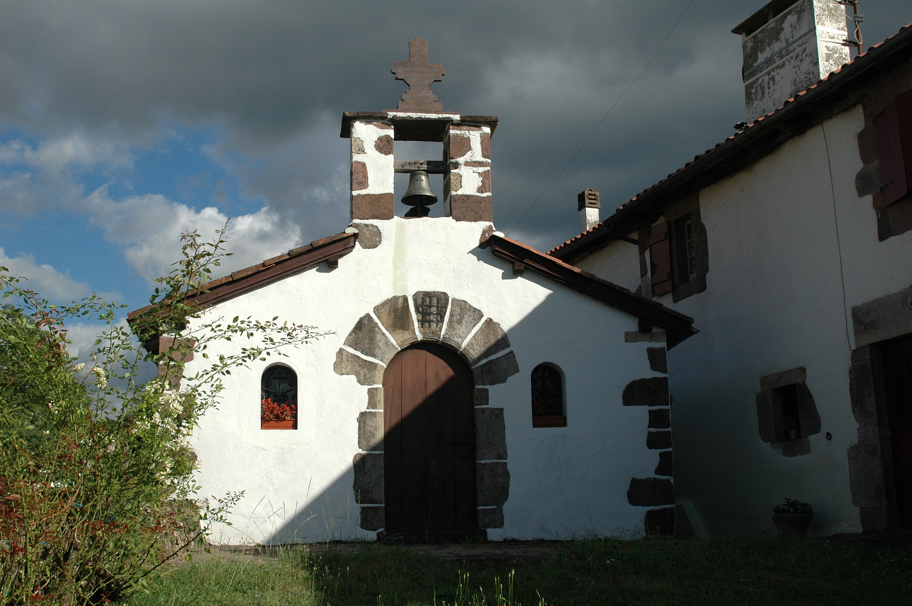 Saint-Étienne-de-Baïgorry, la chapelle Saint-Sauveur-d'Occos. Photo prise le 03/08/06 par Harrieta171